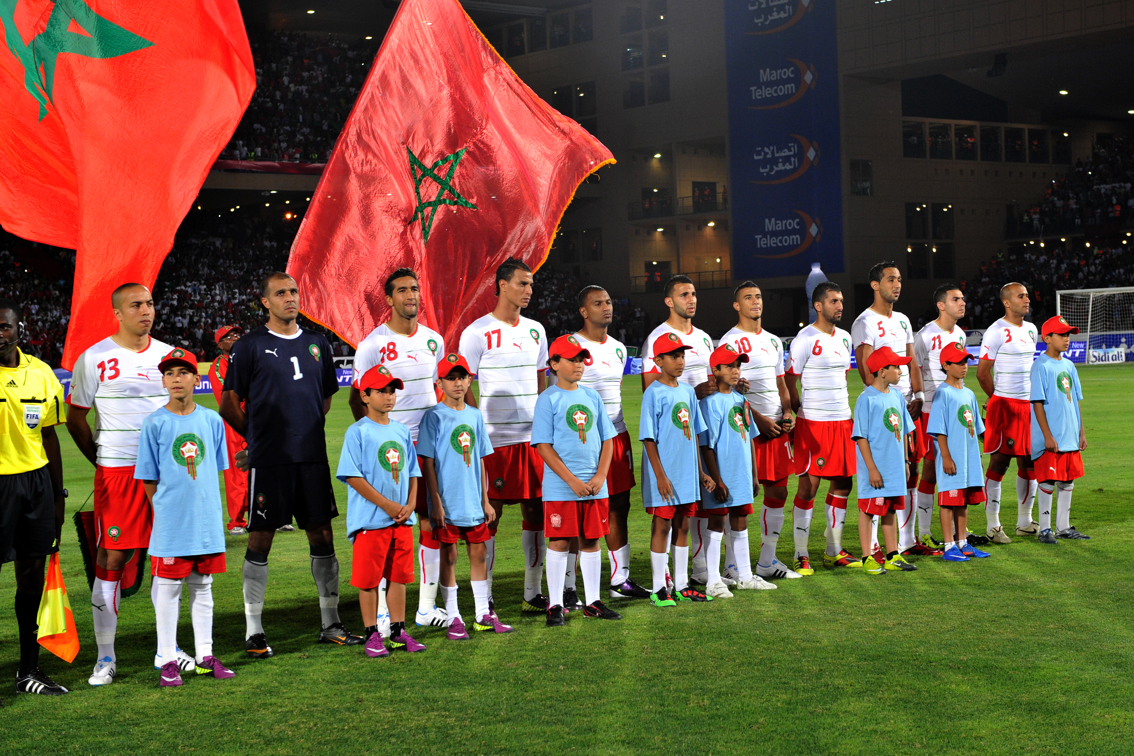 Match Maroc - Algérie